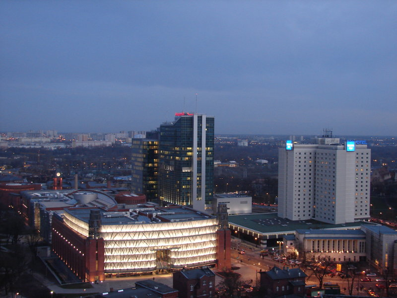 Widok na Stary Browar i Nowe Miasto w Poznaniu